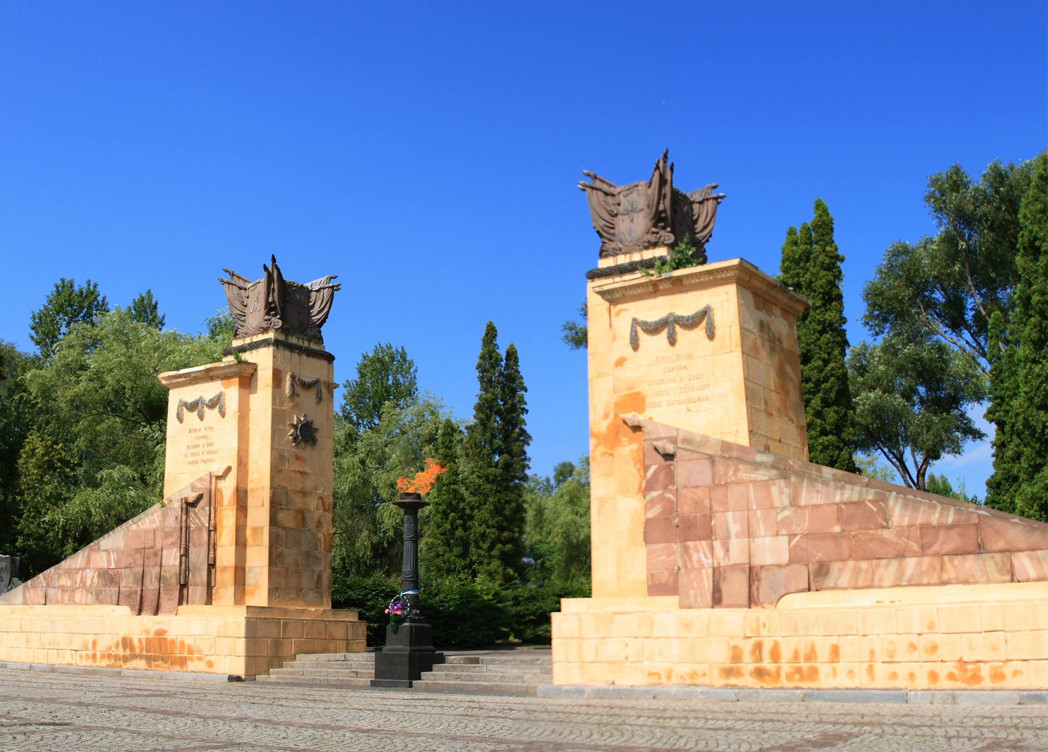 Холм Славы во Львове, вход на мемориал